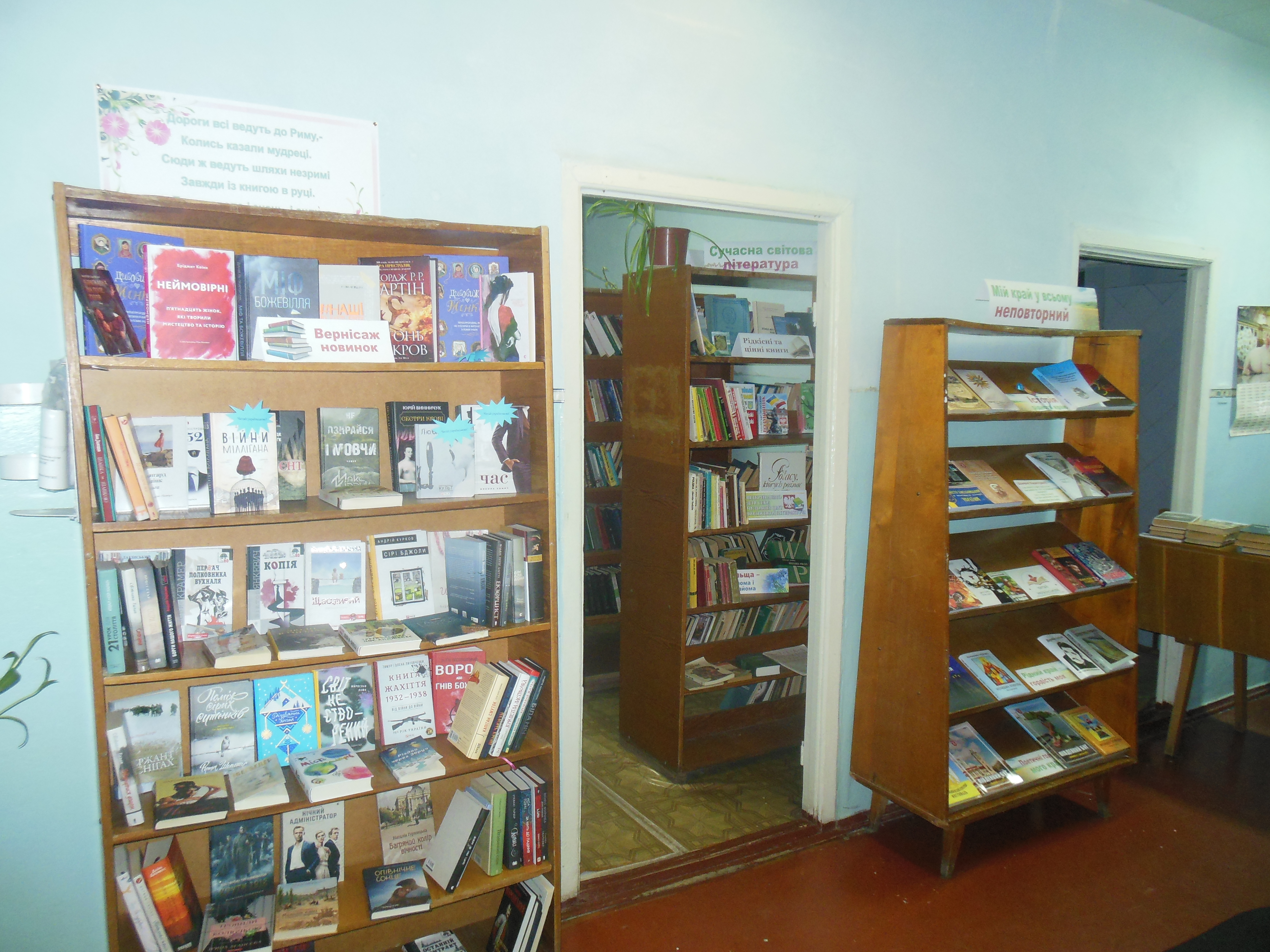 Абонемент бібліотеки-філії №3